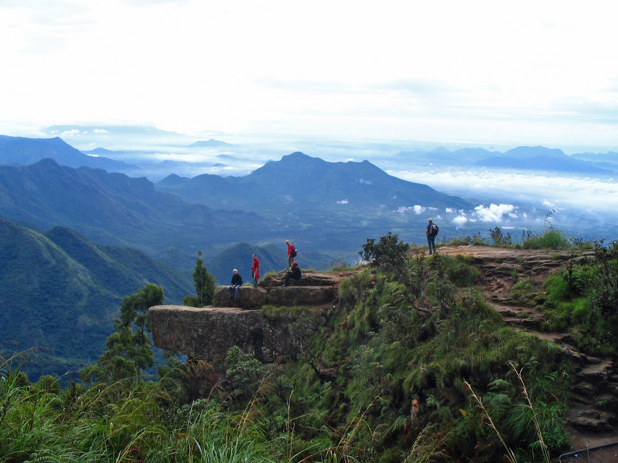 Auf einer Wanderung in den Palani Hills, Kodaikanal